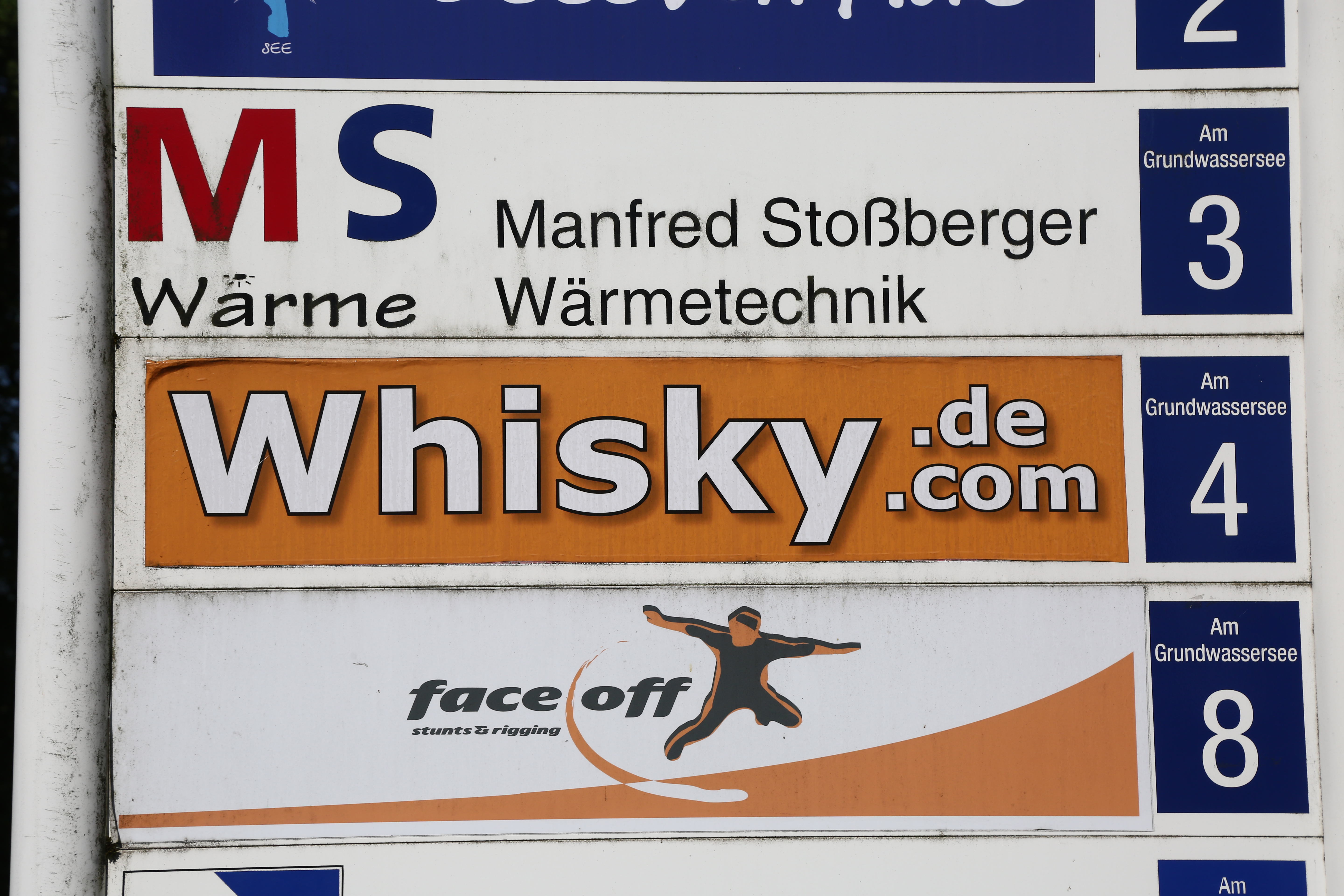 Hinweis- und Werbetafel für in Seeshaupt.